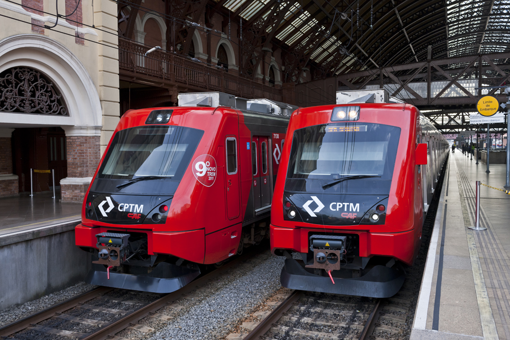 Crédito: Arquivo/ANPTrilhos